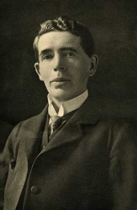 Бьюри, Джон Багнелл - ирландский историк, византинист.